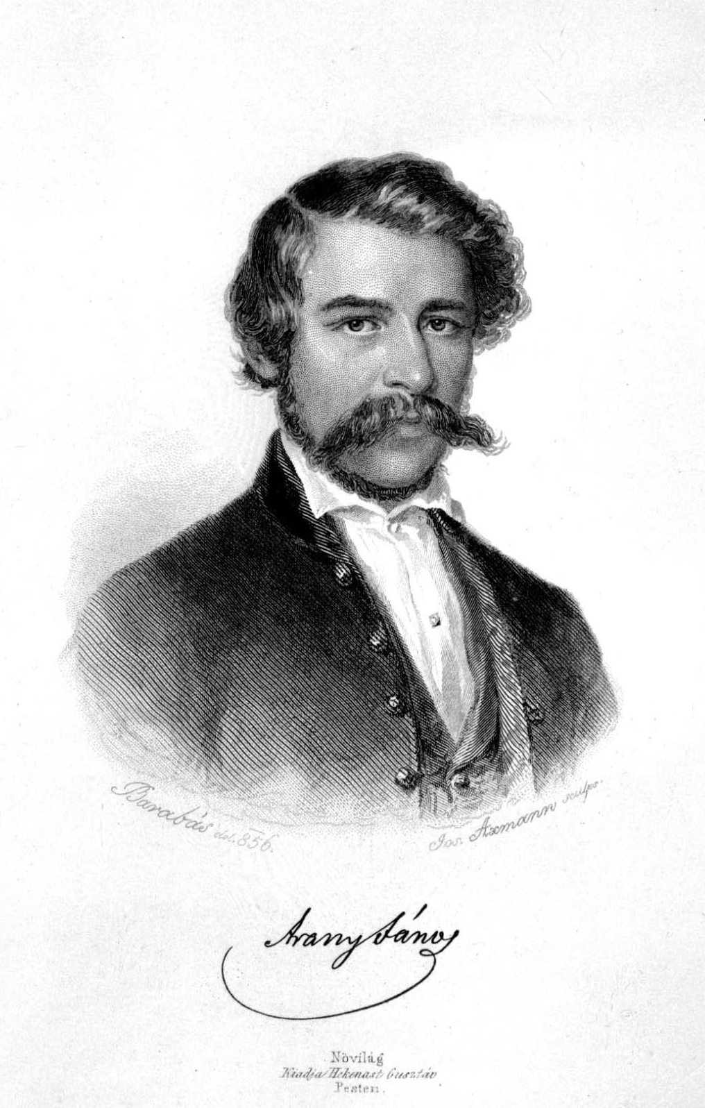 Arany János költő